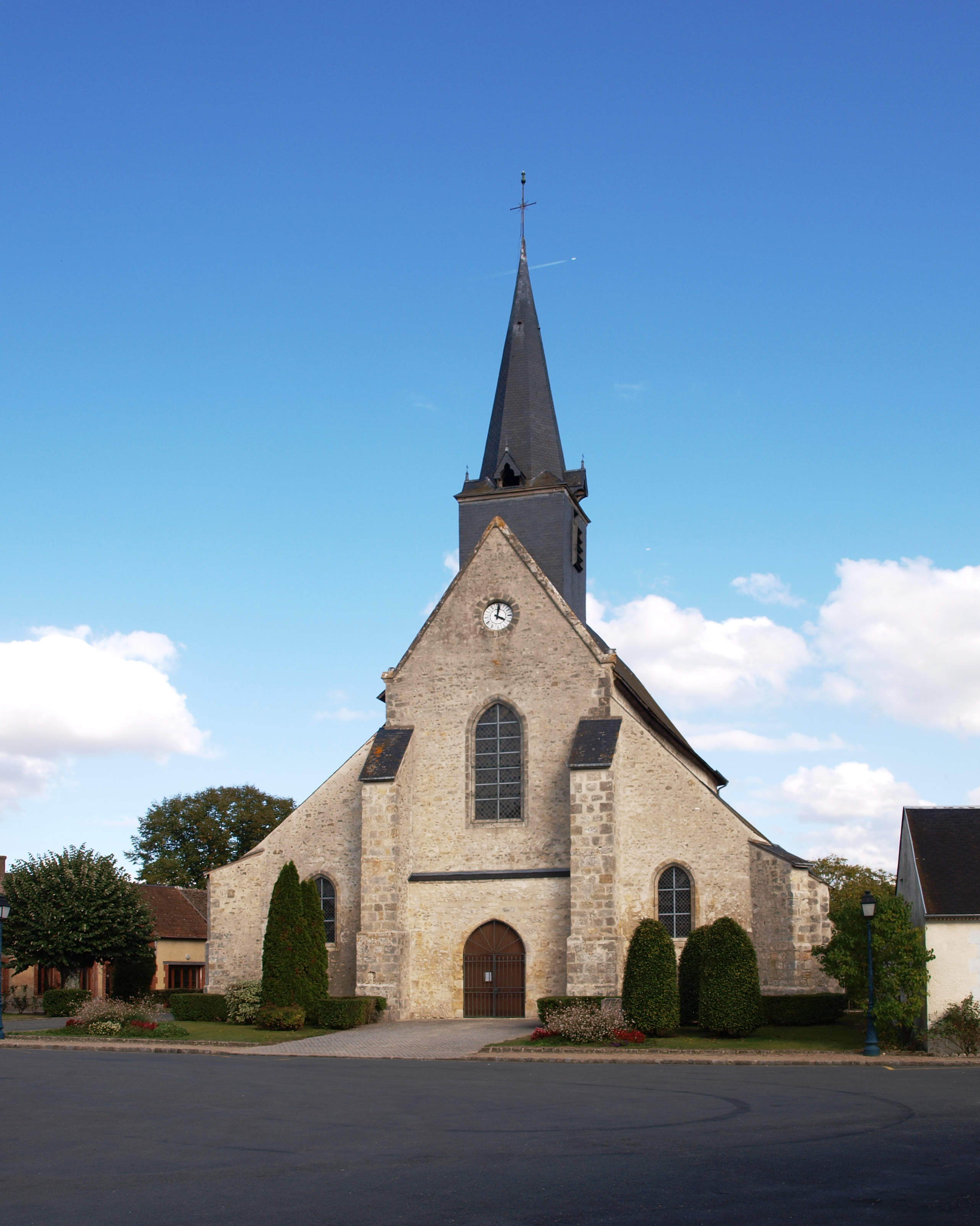 Sury-aux-Bois (Loiret, France) ; église.